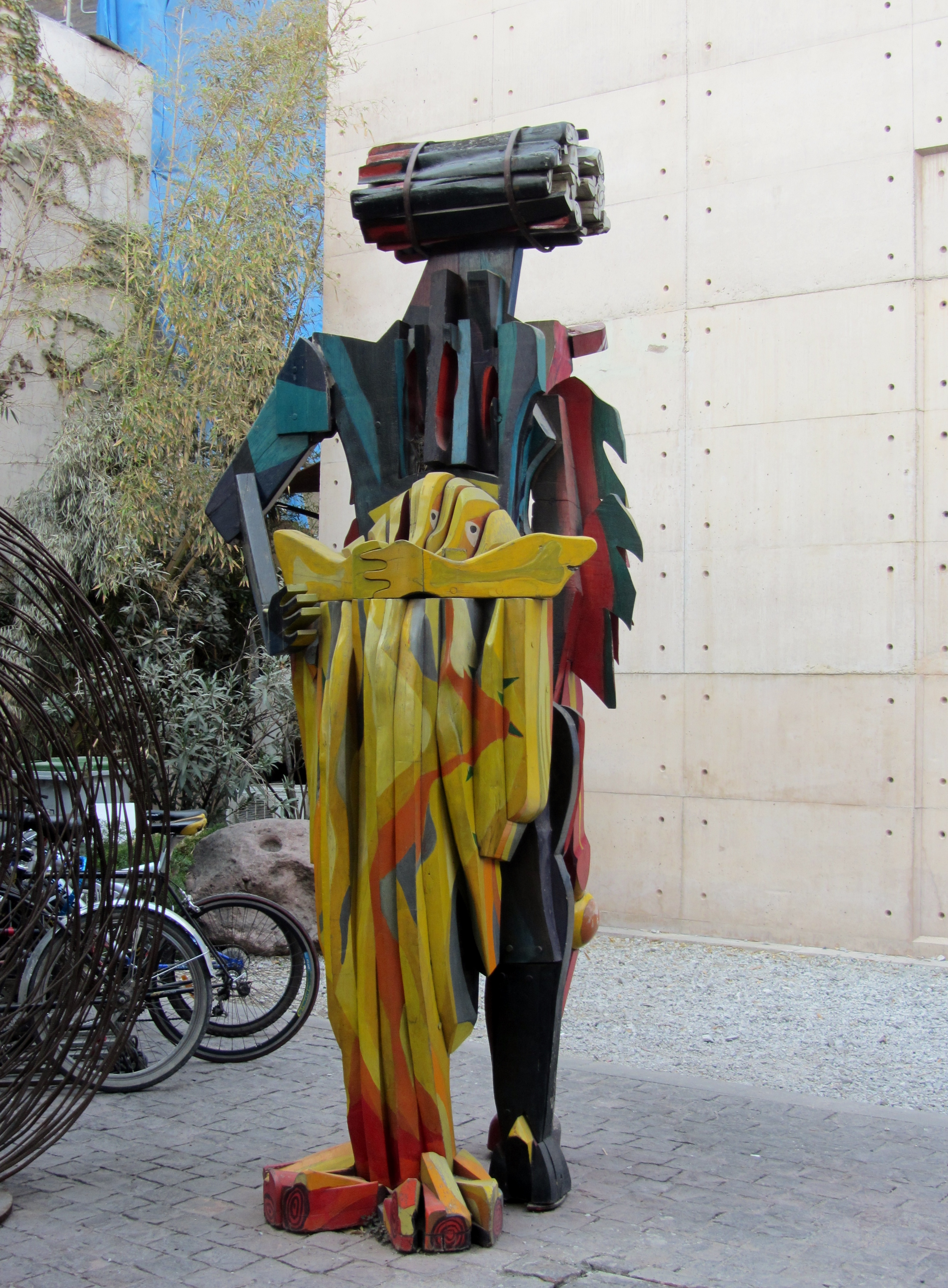 El mediador, escultura de la chilena Pancha Núñez en la plaza Mulato Gil de Castro, Santiago de Chile.